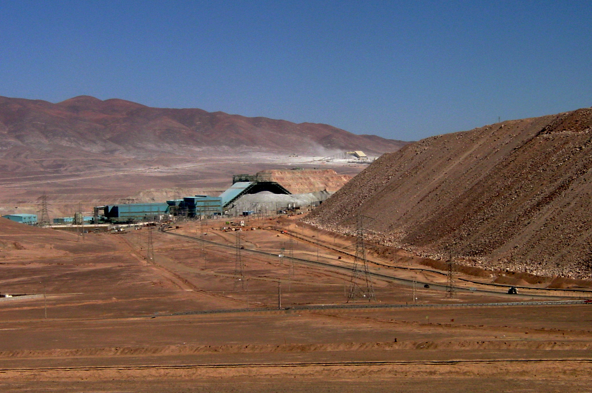 Usine de concentration Los Colorados sur le site de la Mina La Escondida (Mine de cuivre), Province d'Antofagasta, Chili.